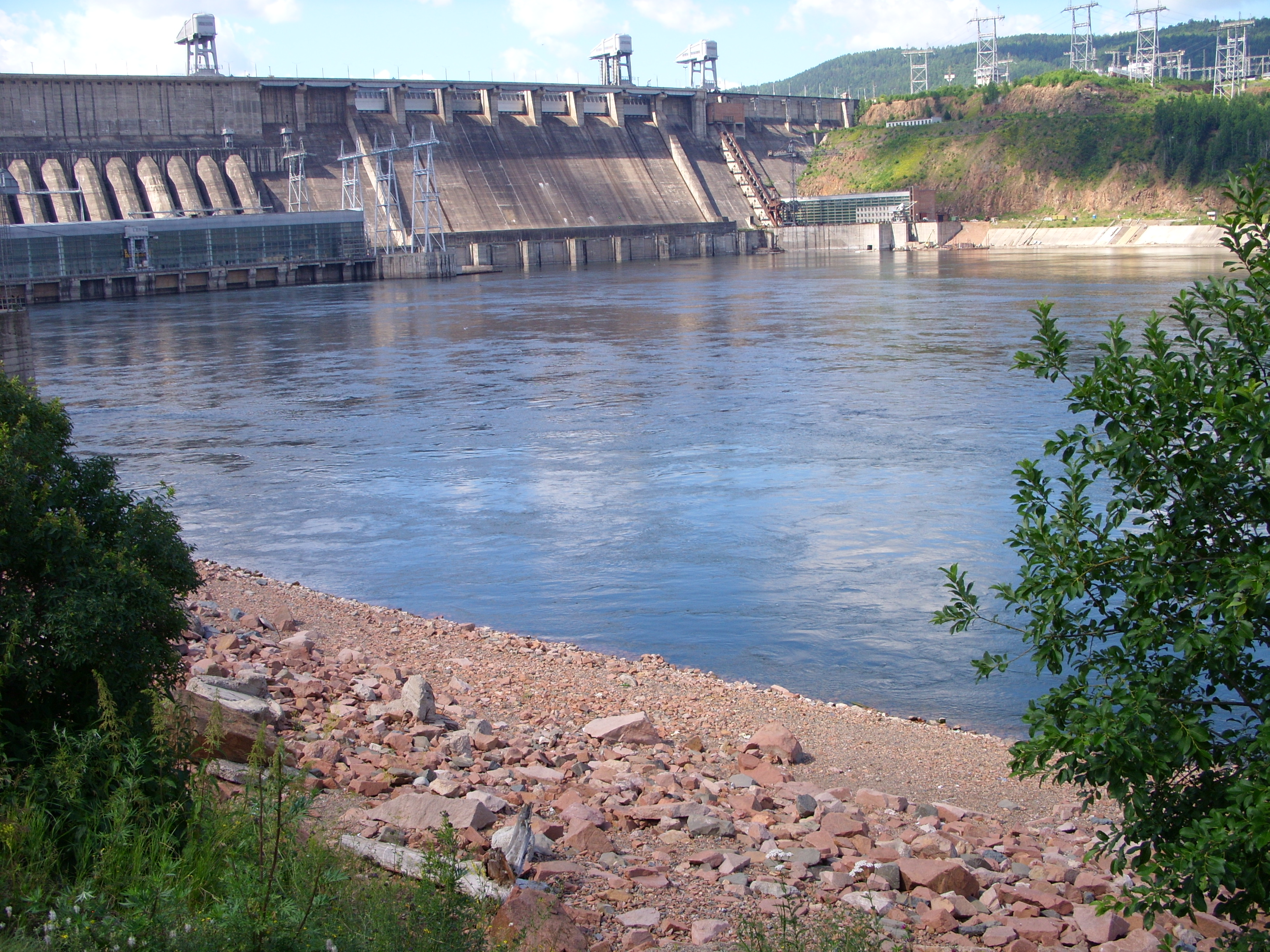 снимки июля 2008 г.